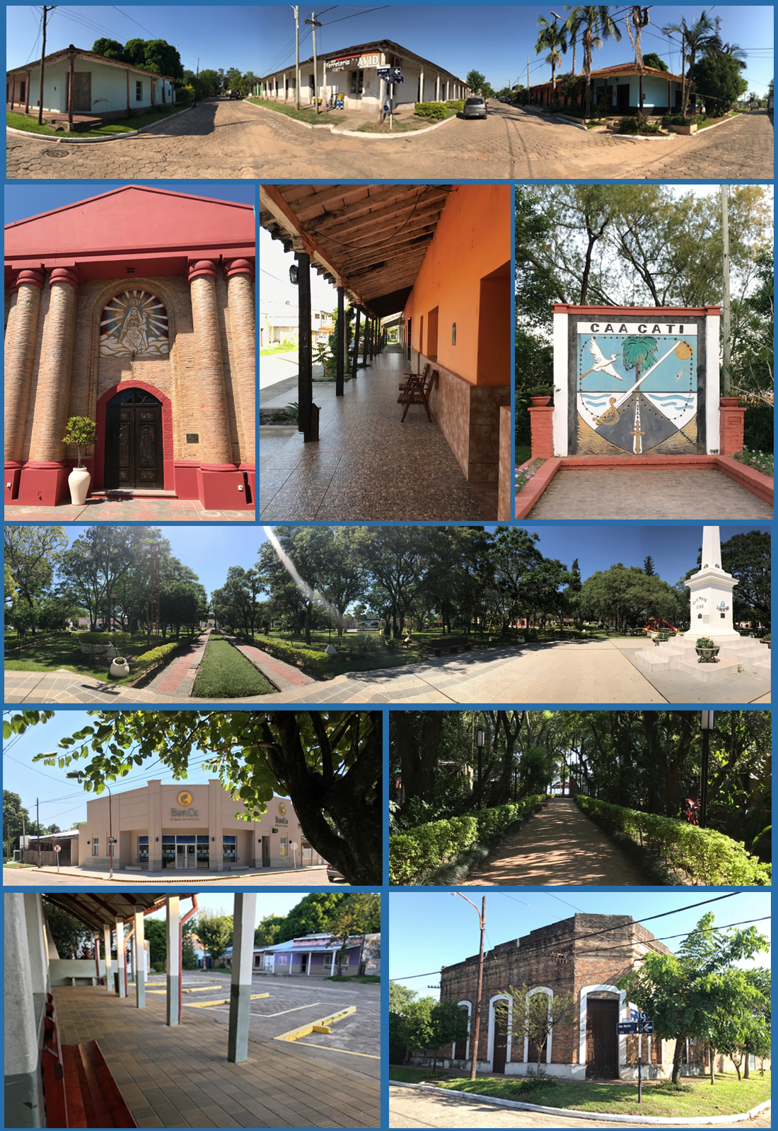 Collage de fotos de Caá Catí. Desde arriba a la izquierda: Vista panorámica de casas coloniales • Fachada de la Iglesia de Nuestra Señora del Rosario de Caá Catí • Galerías sobre las veredas • Escudo en la entrada de la Ciudad • Vista panorámica de la Plaza 25 de Mayo • Sede del Banco de Corrientes • Entrada al Balneario El Rincón • Terminal de ómnibus • Fachada de una casa colonial.